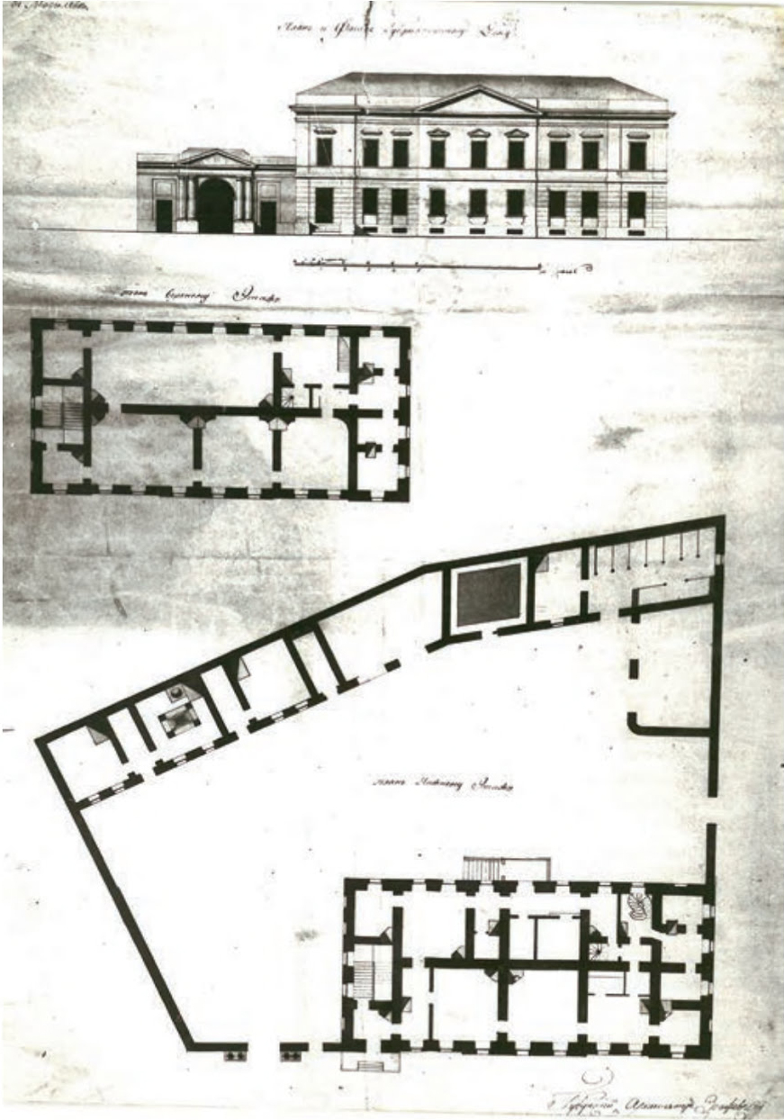 Беларуская (тарашкевіца): Магілёў (Mahiloŭ), пляц Рынак (plac Rynak). Палац губэрнатара